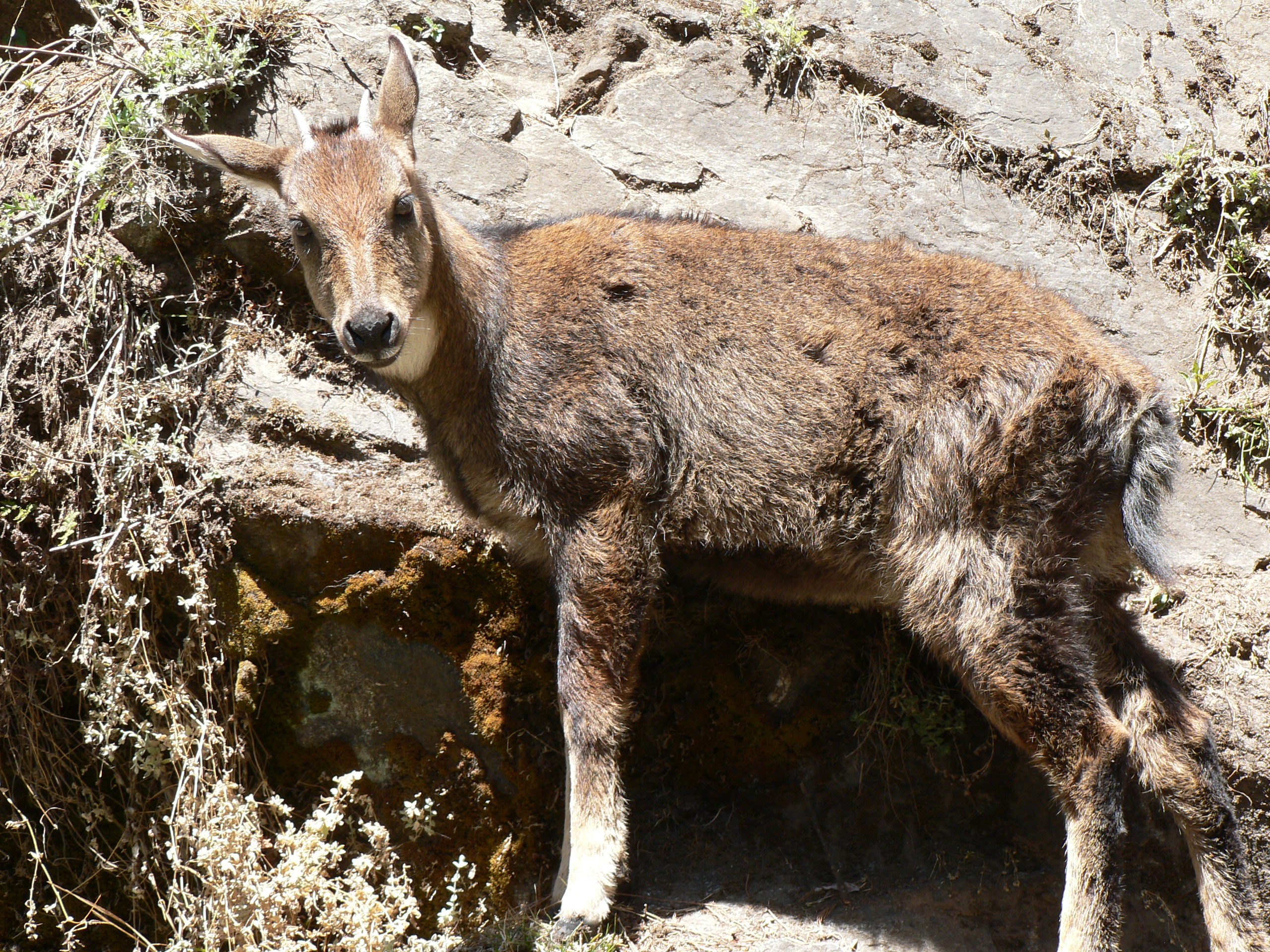 Himalayan goral (Naemorhaedus goral goral)